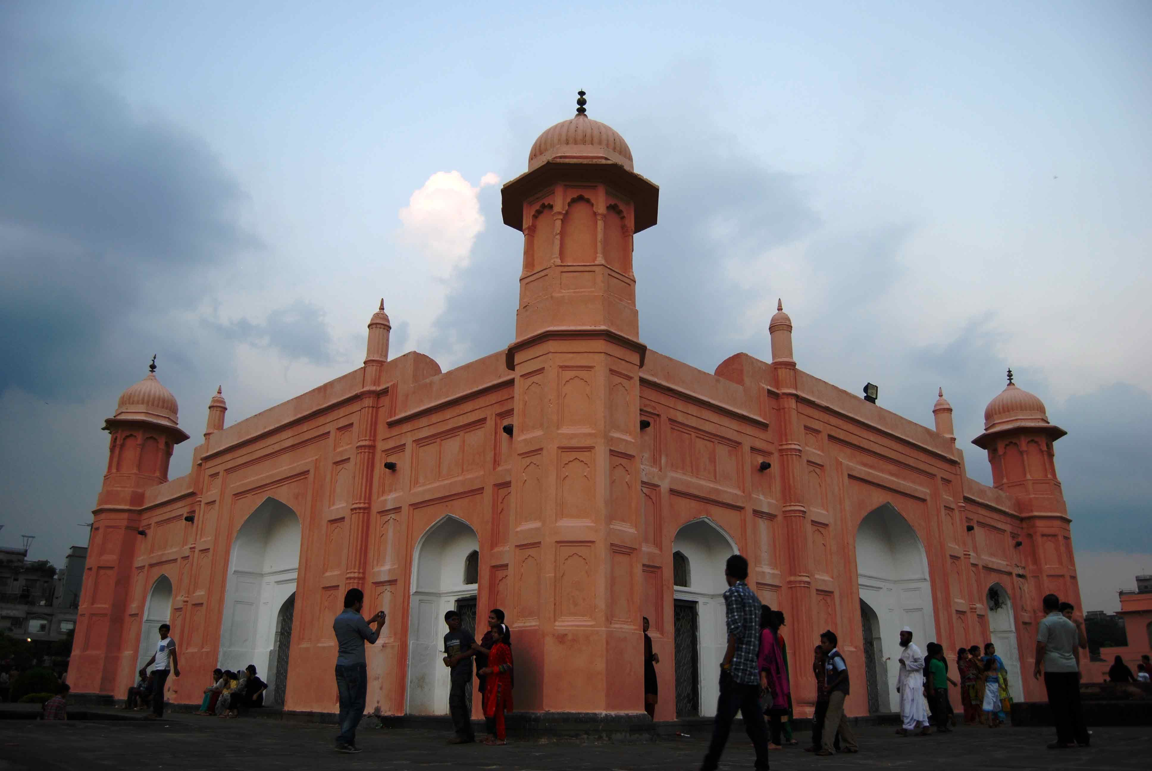 লালবাগ দুর্গ মসজিদ